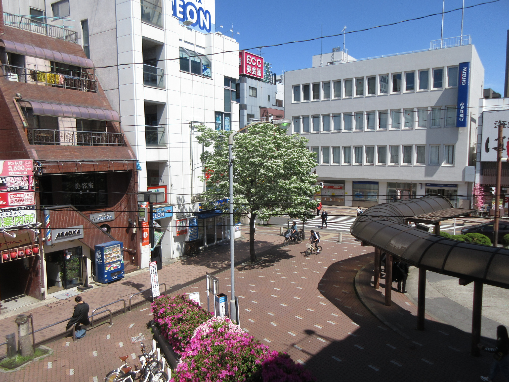 東岡崎駅北口、みずほ銀行岡崎支店